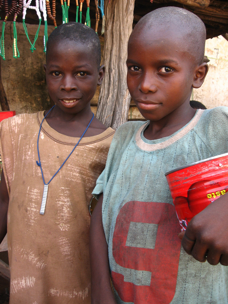 Talibe in Velingara